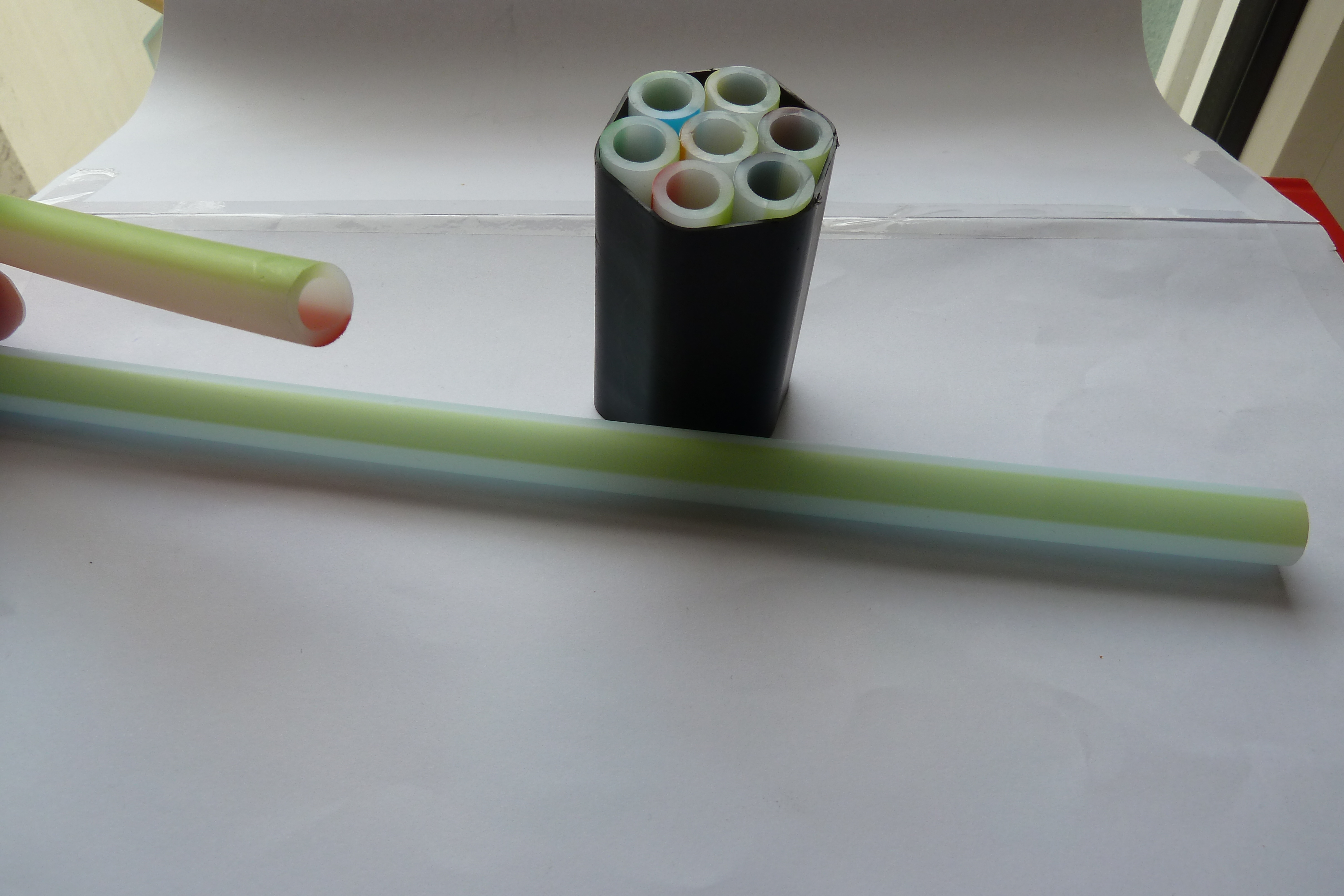 Querschnitt eines Rohres mit sieben Lehrrohren ("Speedpipes") und zwei einzelne Lehrrohre, gut sichtbar sind die farbigen Markierungen an den einzelnen Röhrchen, die damit gut zu unterscheiden sind